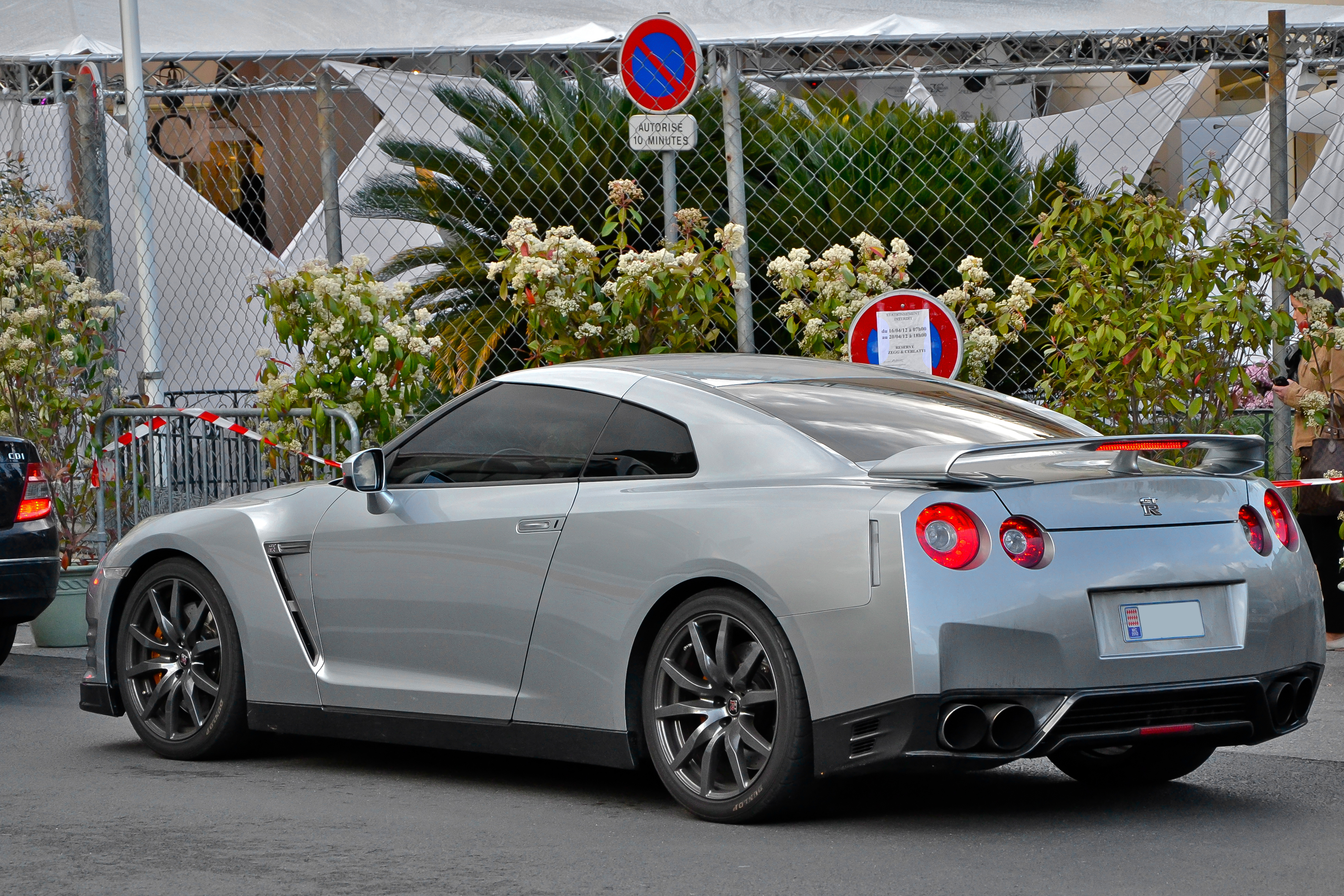 Nissan GTR